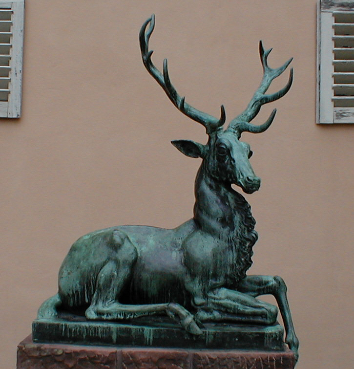 Bronzestatue eines Hirsches vor dem Jagdschloss Kranichstein